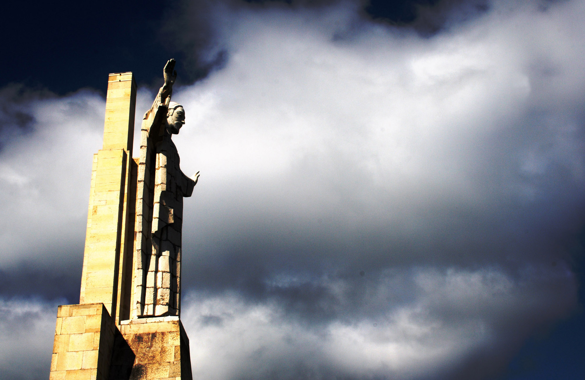 Escultura del Sagrado Corazón ubicada en la cima del monte Naranco (Oviedo-Asturias-España)